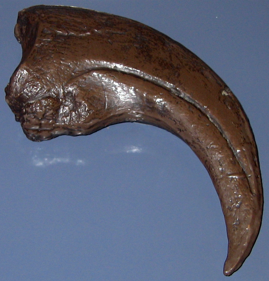 Moulage d'une griffe de baryonyx lors de l'exposition "la faim des dinosaures".